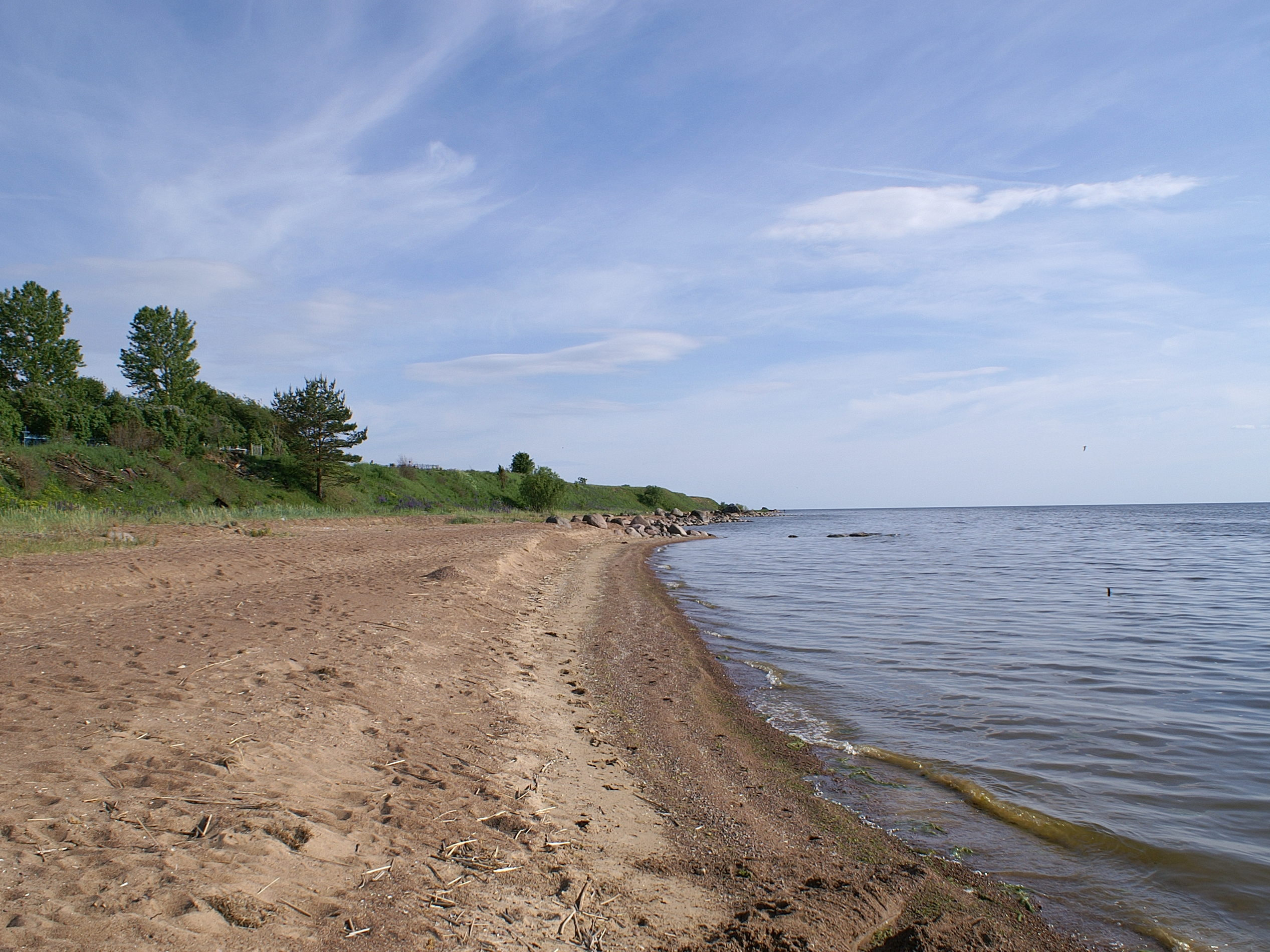 Чудское озеро в селе Ветвеник, Гдовский р-н Псковской обл., Россия Chudskoye lake by Vetvenik village, Gdov district, Pskov oblast, Russia